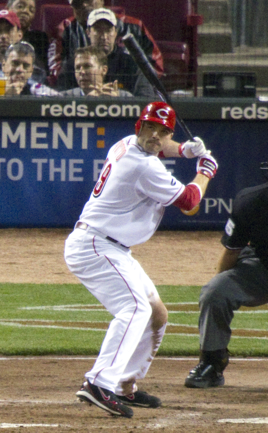 Joey Votto